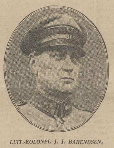 Commandant van van het Korps Koloniale Reserve in Nijmegen en Ridder der Militaire Willemsorde 4e Klasse voor krijgsverrichtingen te Soemba.